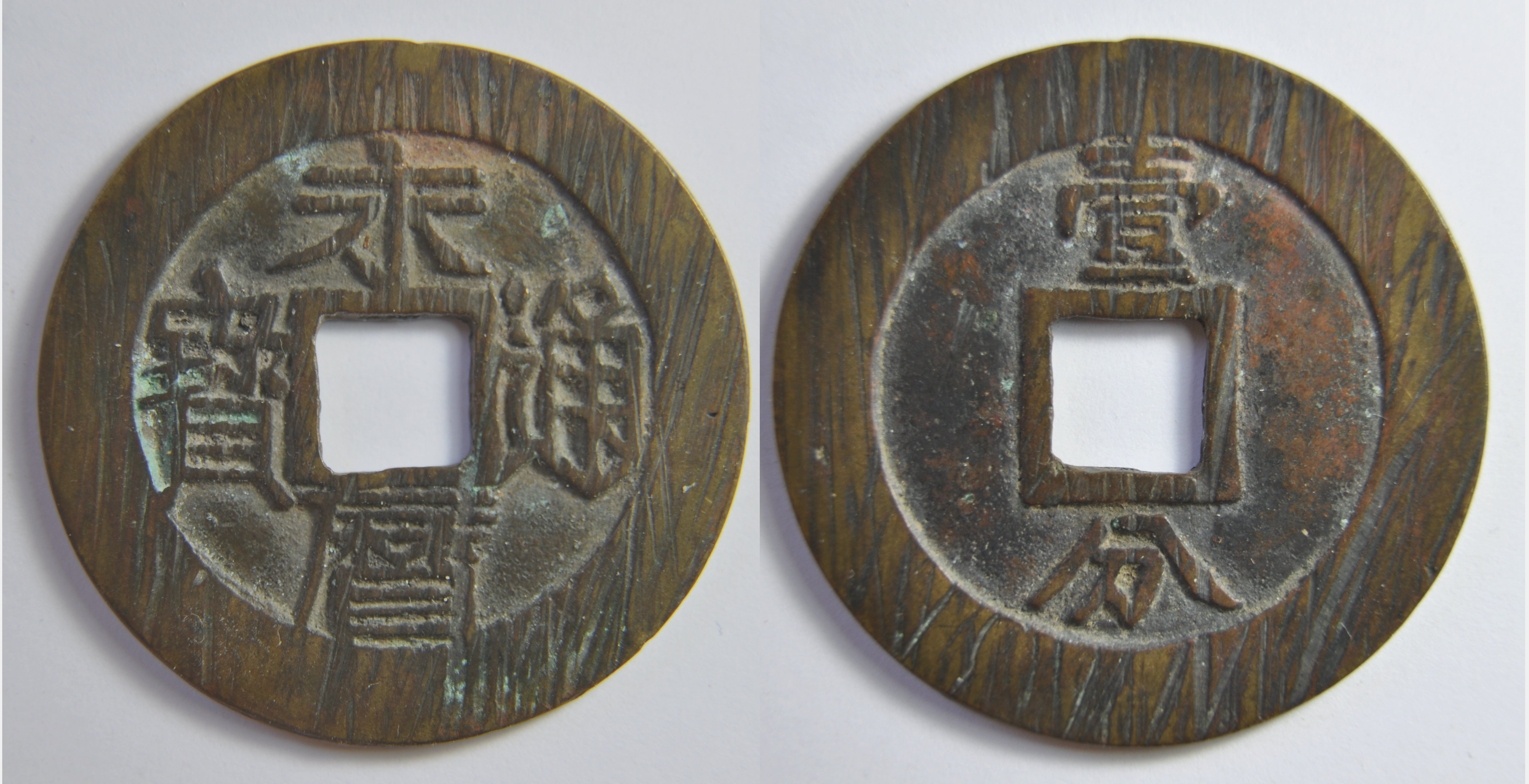 Une monnaie de 10 sapèques (10 cash) du prince Yongming (1646-1659), un petit-fils de l'empereur Ming Wanli. En décembre 1646, il est proclamé empereur et prend le nom d'ère de Yong Li et commence à fabriquer des monnaies. Il quitte la Chine quand les Manchous prennent le Yunnan en 1659 et se réfugie en Birmanie où il est mis à mort en 1662 à la demande de ceux-ci. Ce n'est donc pas à proprement parler un rebelle Qing puisque c'est le dernier Ming. Néanmoins, les Chinois considèrent que la dynastie Qing commence en 1644, je préfère donc le traiter comme tel. A/ Yong Li tong bao (Monnaie courante de Yong Li) R/ Yi fen (1 fen) Dimension : 35.6 mm Poids : 9.1 g. Référence : H21.79 Remarque : 1 fen désigne le poids d'argent équivalent à la monnaie.